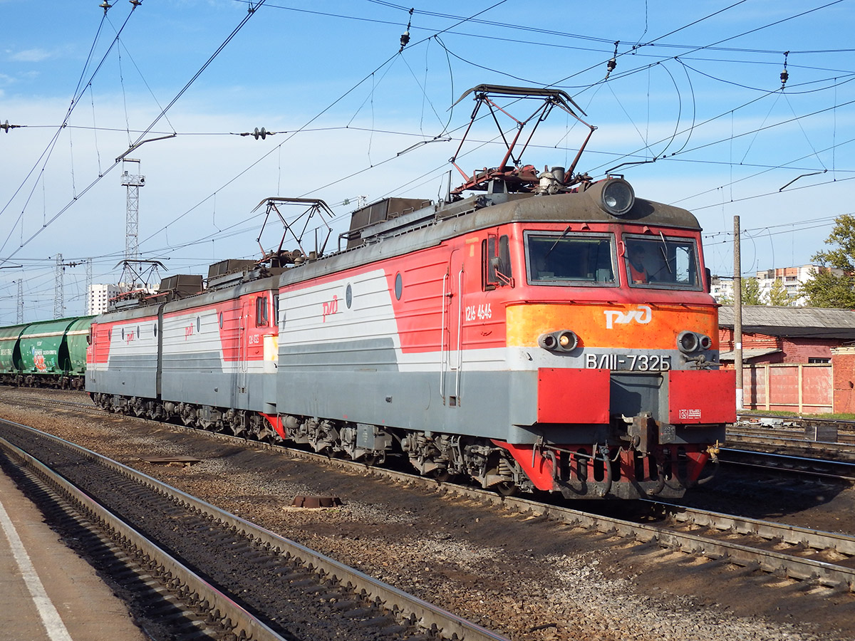 Электровоз ВЛ118-732Б+ВЛ118 в составе трёх секций Россия, Орловская область, станция Орёл